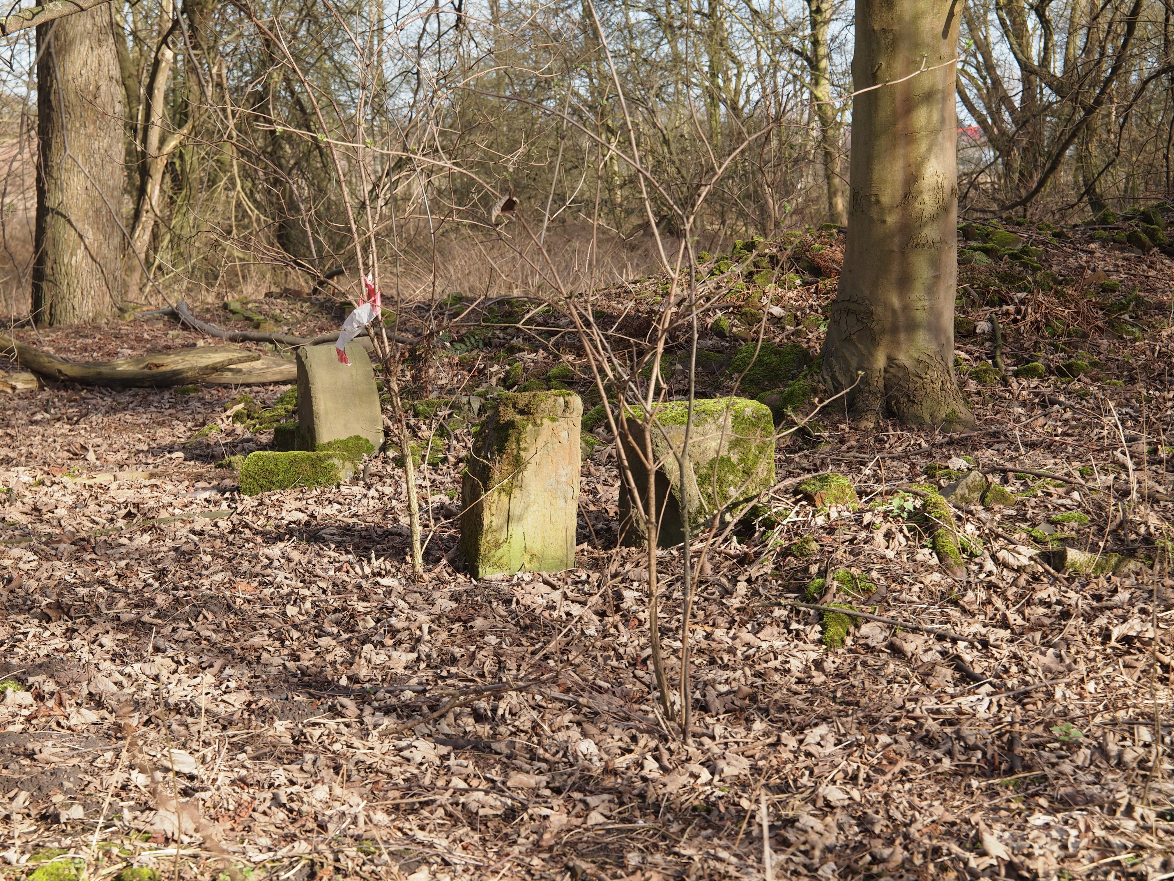 Naturschutzgebiet Grimberg in Gelsenkirchen (GE002), Stadtgrenze zu Herne, Trümmer des ehemaligen Schlosses Grimberg auf dem Boden